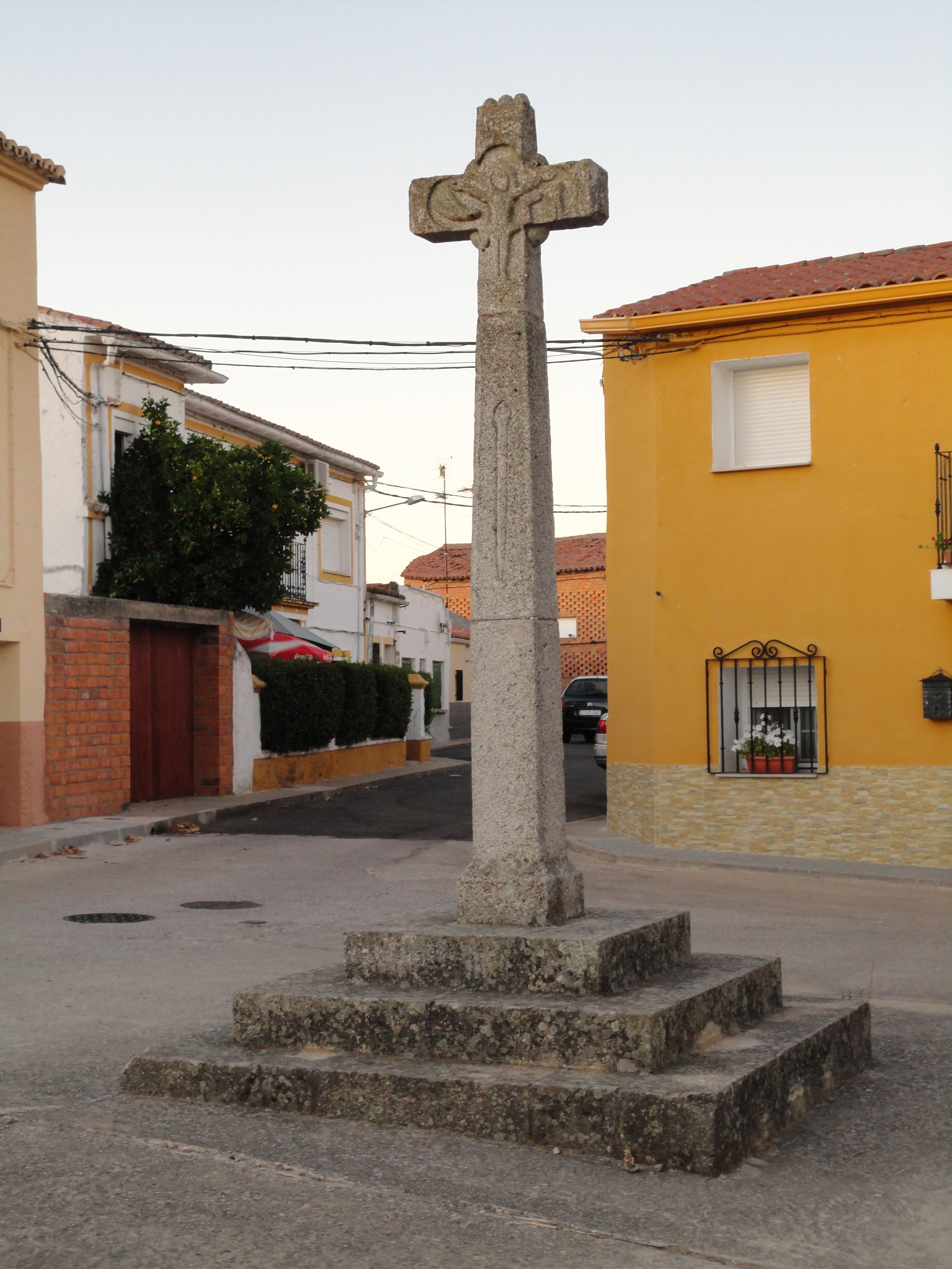 Cruz en Huélaga, provincia de Cáceres, España.